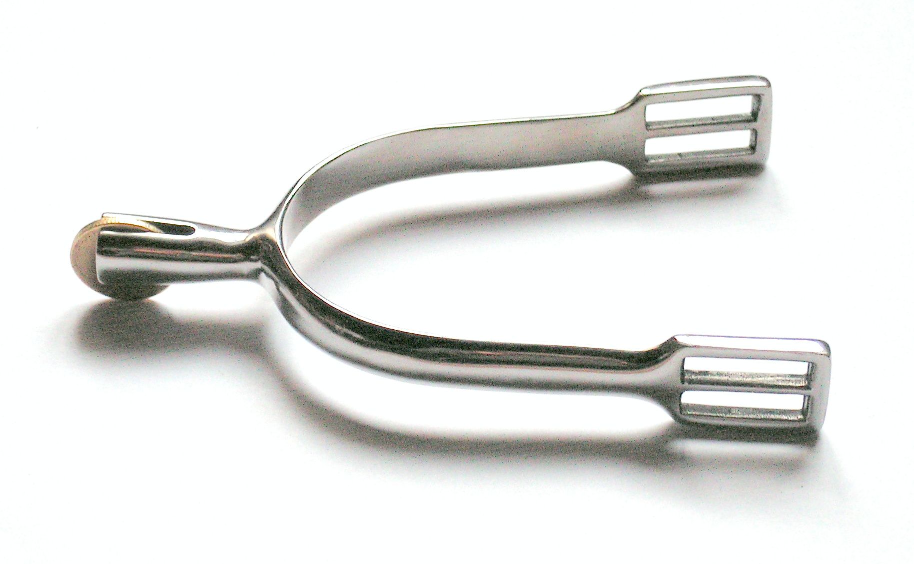 Eperon prince de Galle avec une molette lisse